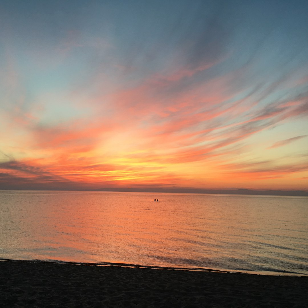 Sunset on Lake Baikal